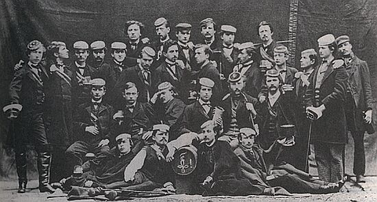 Gruppenbild der Bonner Burschenschaft Frankonia, 1865